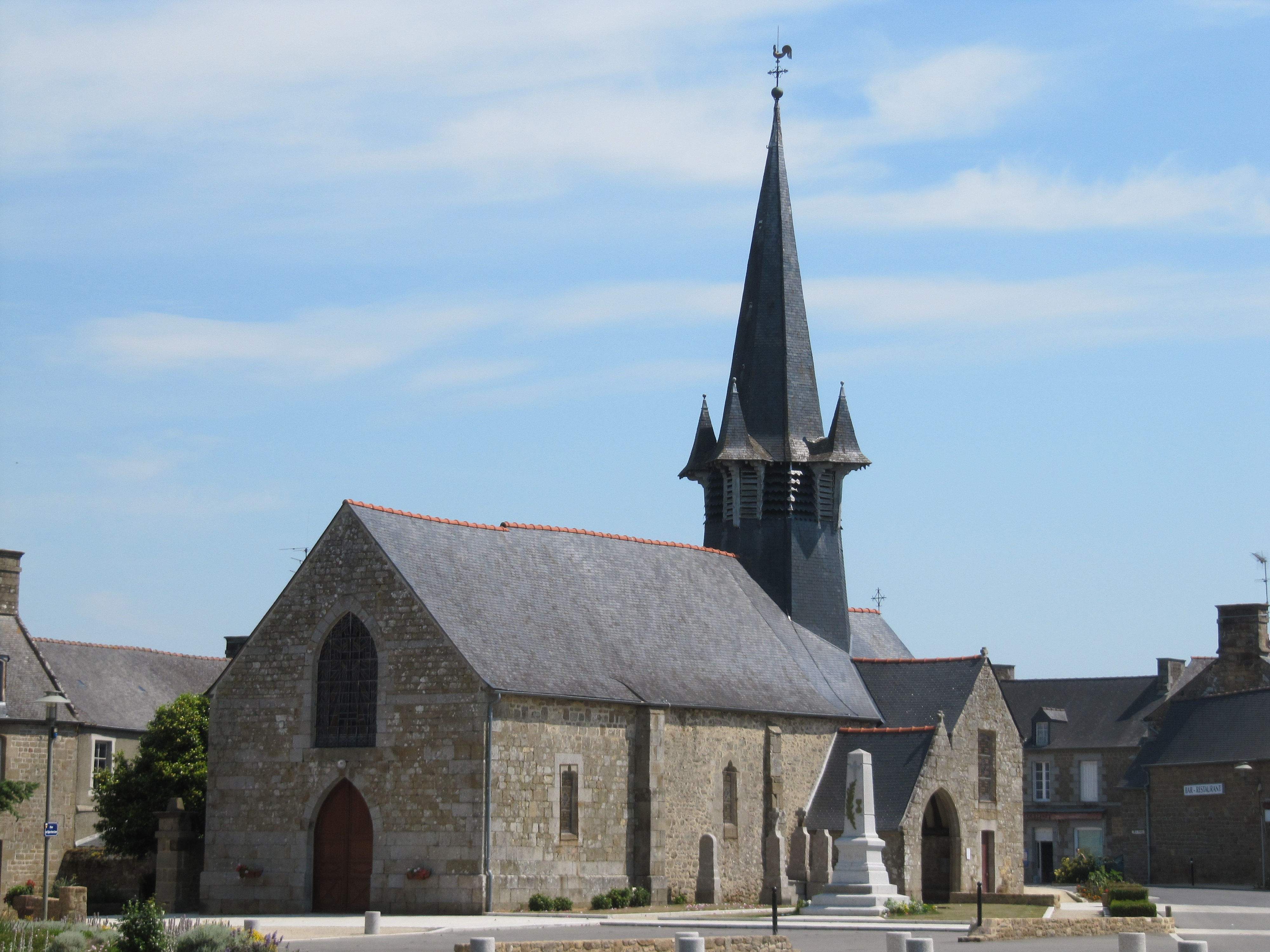 L'église Notre-Dame de Chauvigné